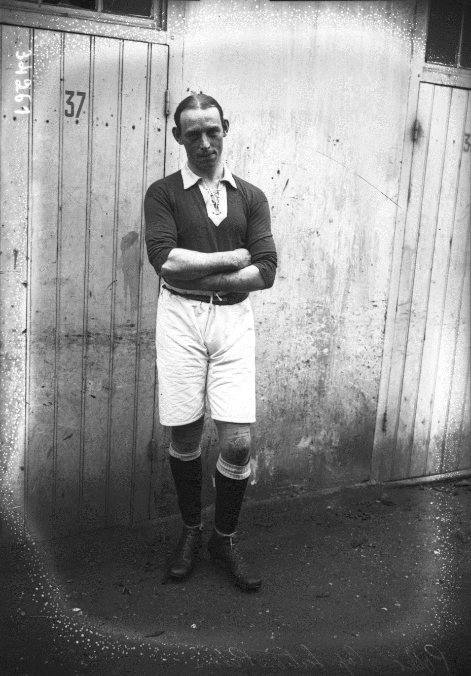 Le gallois Tom Potter, capitaine de la Section paloise en 1913